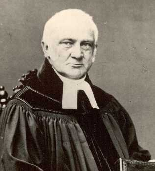 Johann Georg Wermelskirch (1803-1872), Pastor und Missionar